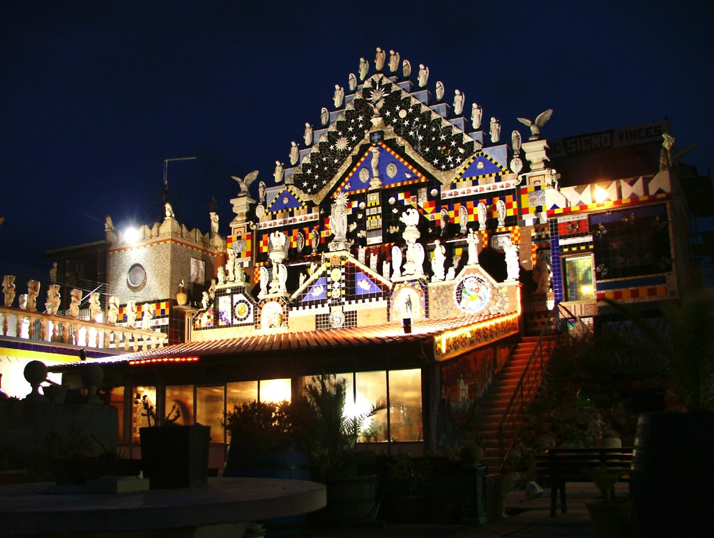 è la casa sita a Guagnano del noto eccentrico pittore Vincent Brunetti. la foto l'ha fatta mia cugino x me qualche giorno fa. Dal satellite si vede così 40°23′36″N 17°56′21″E / 40.39333°N 17.93917°E